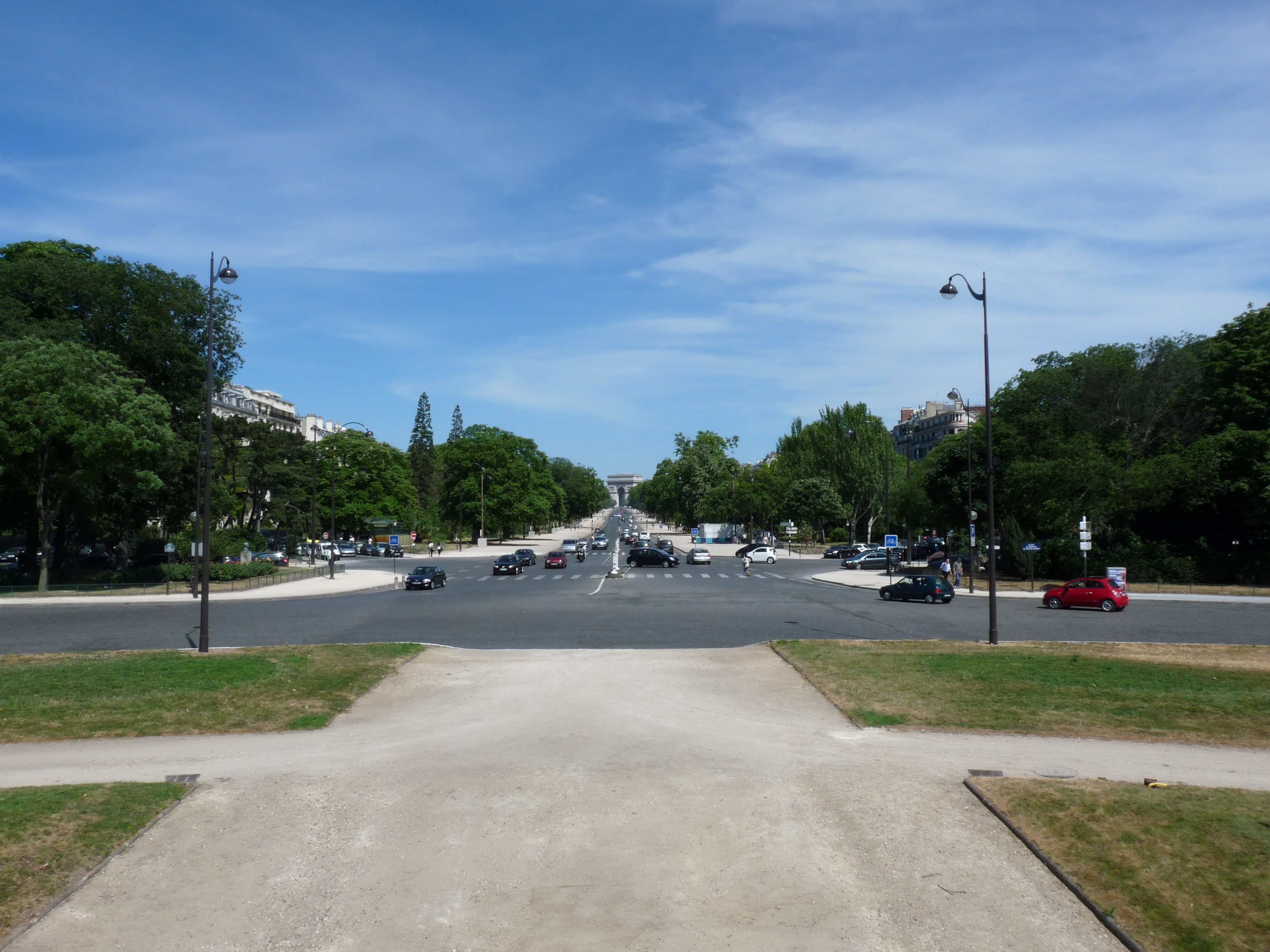 L'avenue Foch à Paris, vue depuis la place du Maréchal-de-Lattre-de-Tassigny en direction de l'arc de triomphe de la place de l'Étoile.